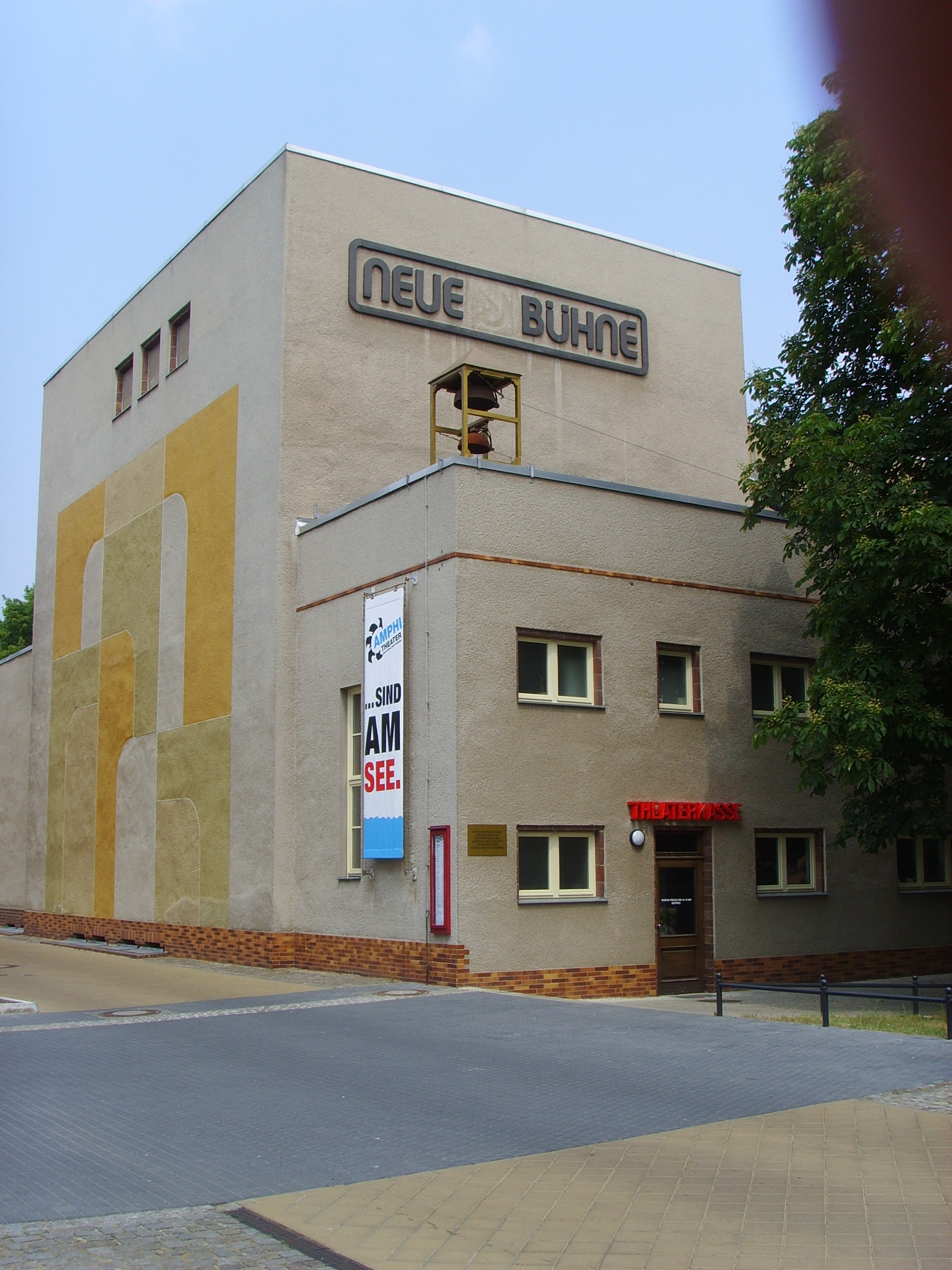 Theater Neue Bühne in Senftenberg